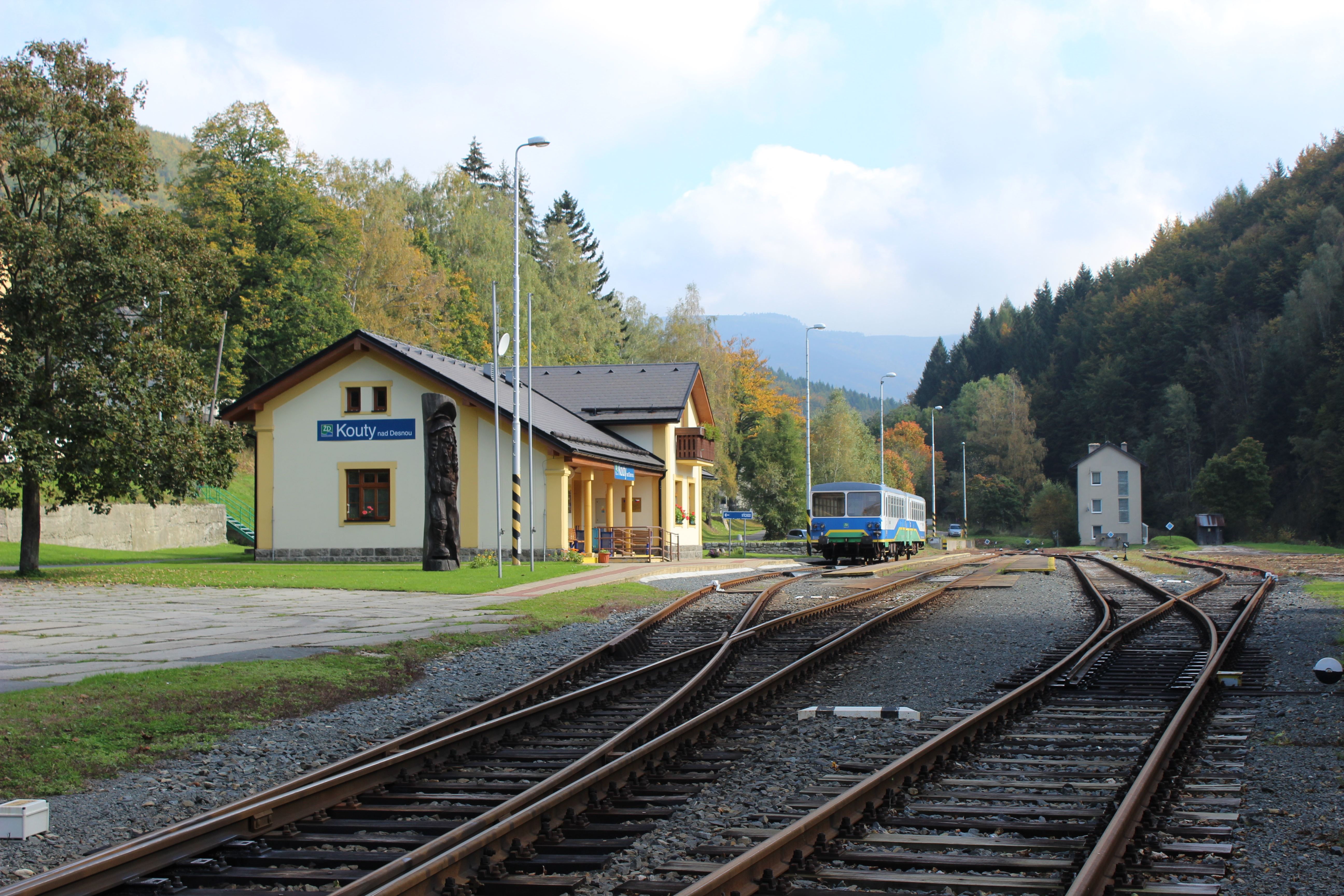 Železniční zastávka v Koutech nad Desnou.